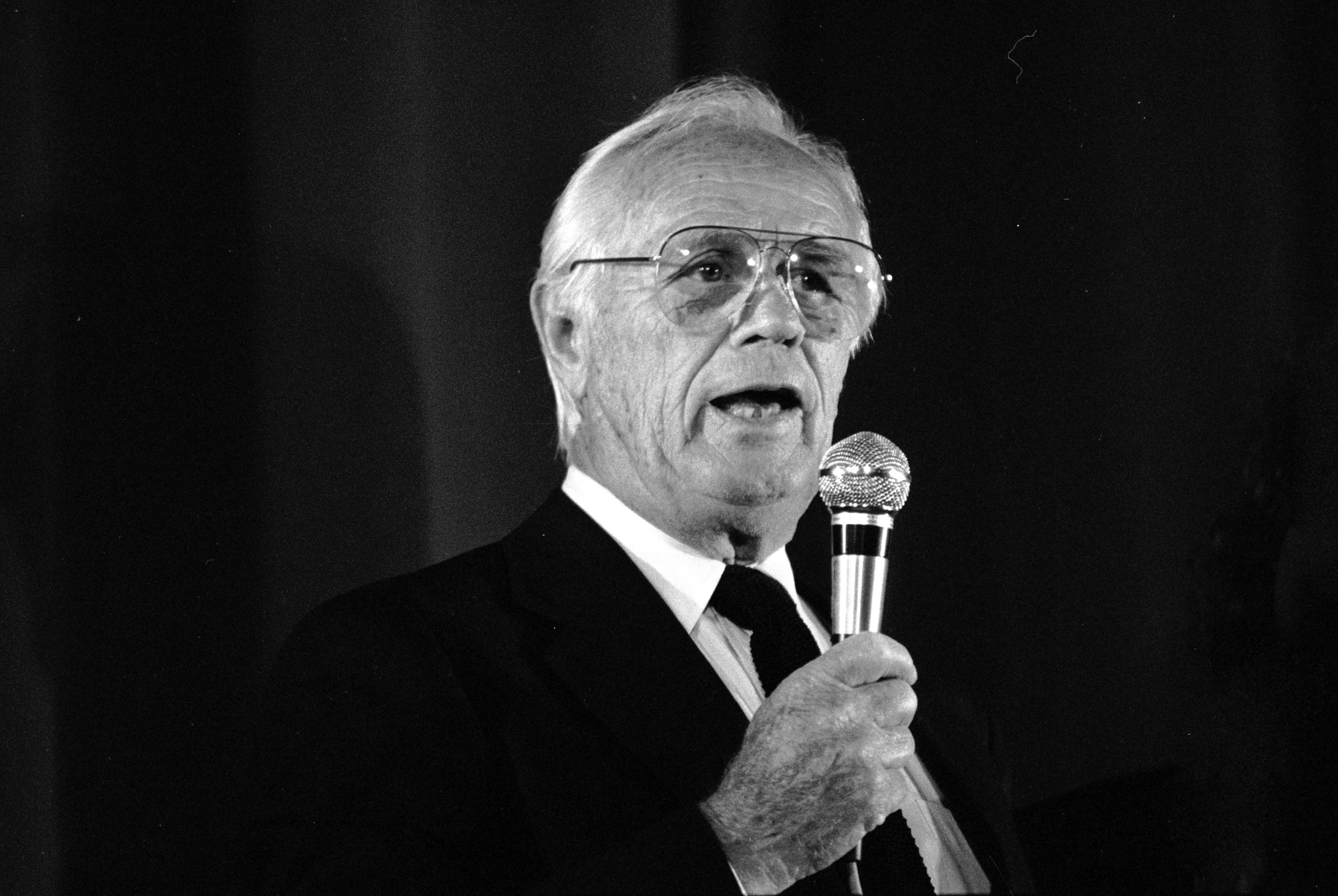 L'acteur américain Richard Widmark au Festival du cinéma américain à Deauville (Normandie, France) en septembre 1991.